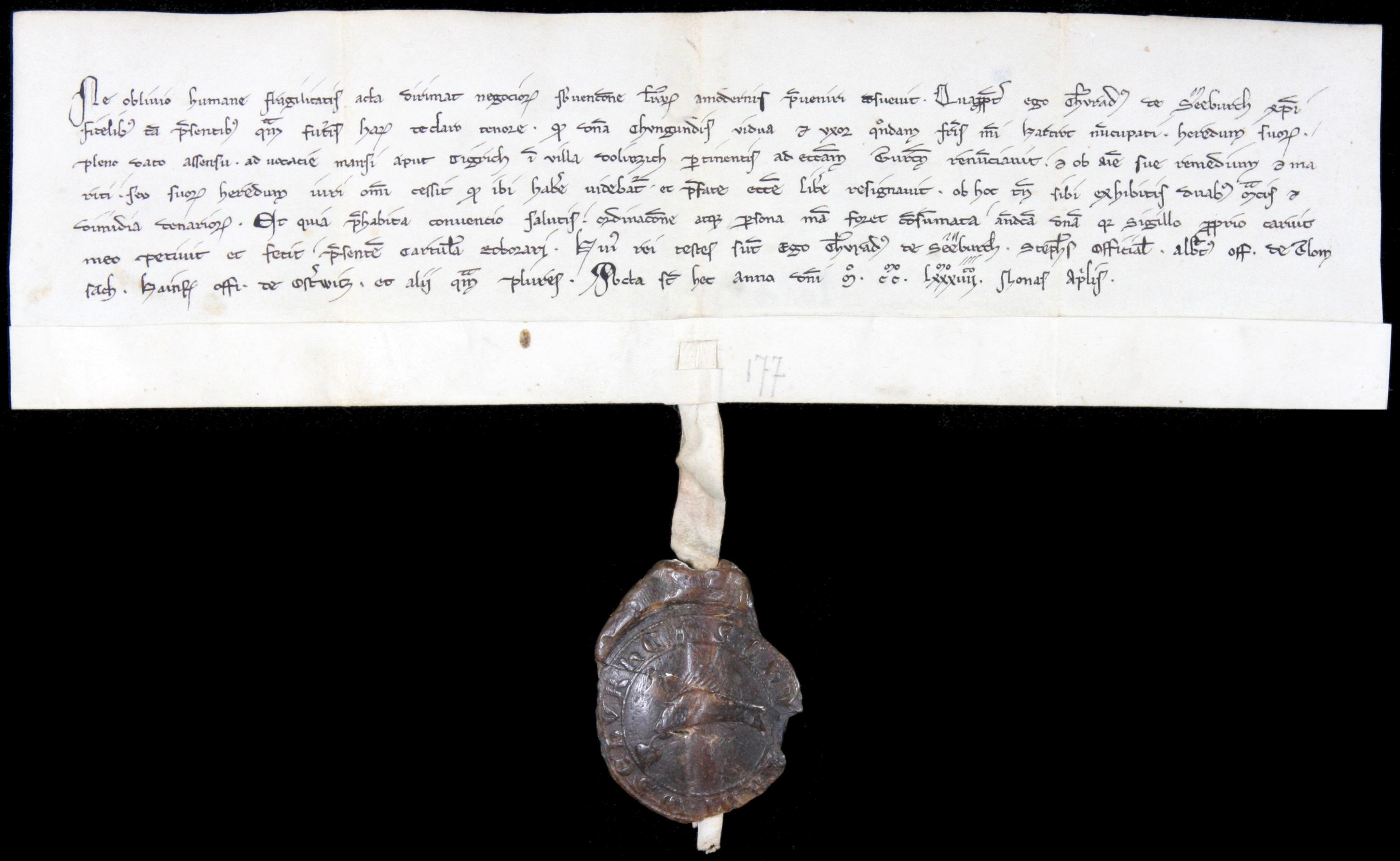 Seeburger Siegel von 1284 mit Fischmotiv